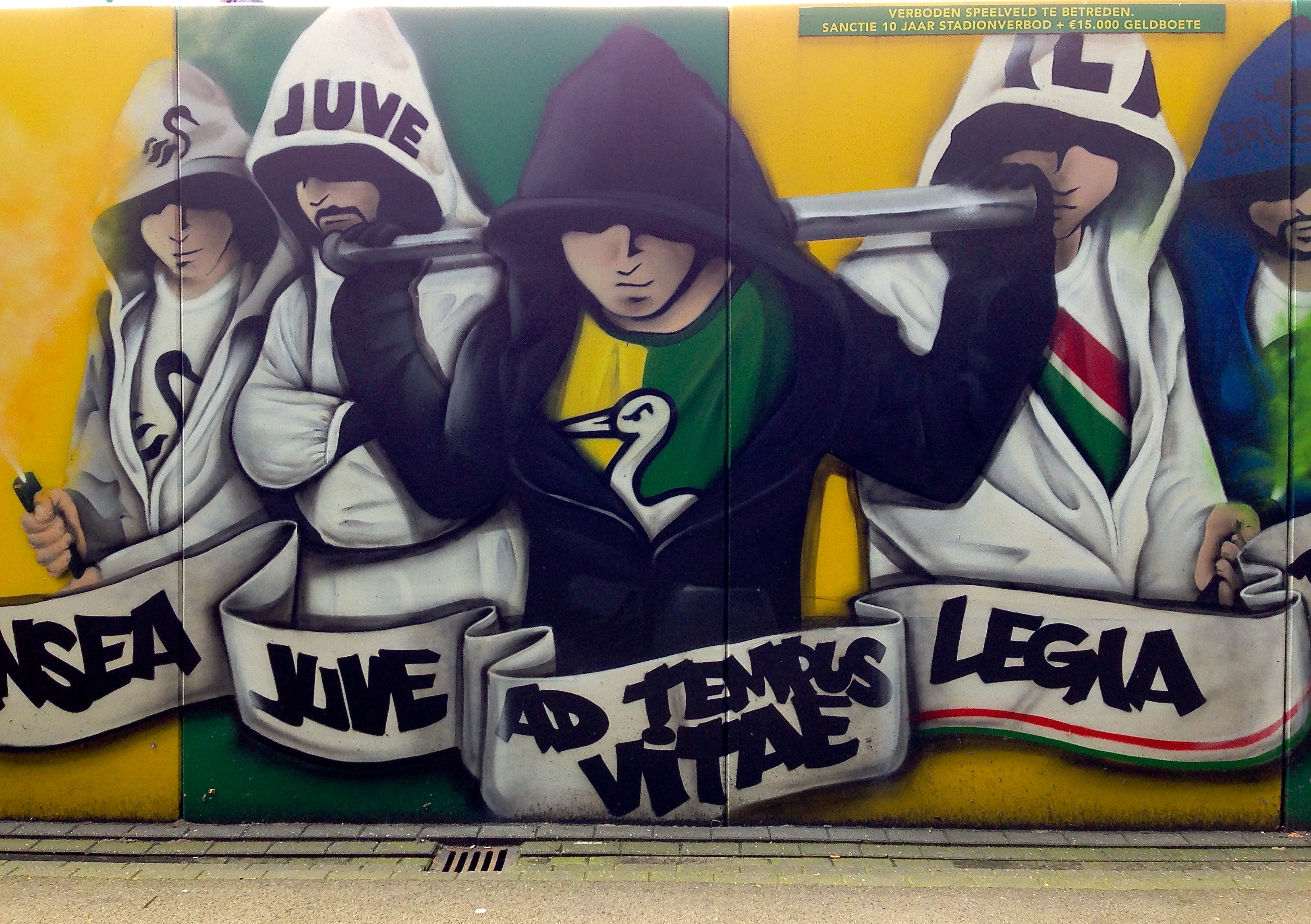 Muurschilderingen in de supporters van ADO Den Haag bij Kyocera Stadion Den Haag, om de link met Legia Warschau, Juventus en Swansea benadrukken.